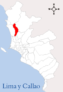 Localización del Distrito de Puente Piedra